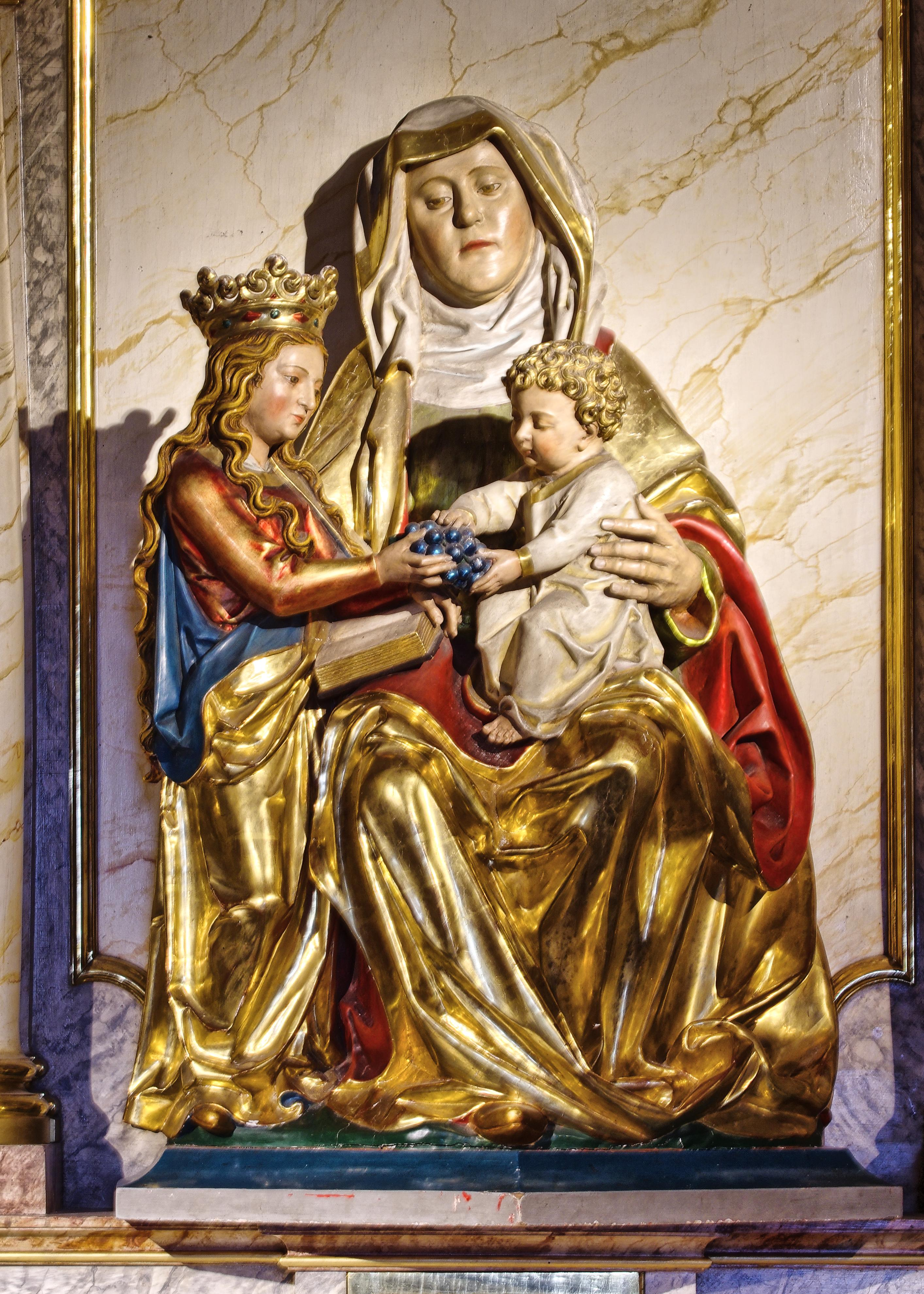 Bilder aus der Kirche St. Martin in Staufen im Breisgau